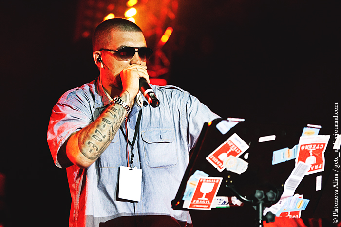 Концерт Басты и Гуфа в Зелёном Театре, 21 июля 2010 года